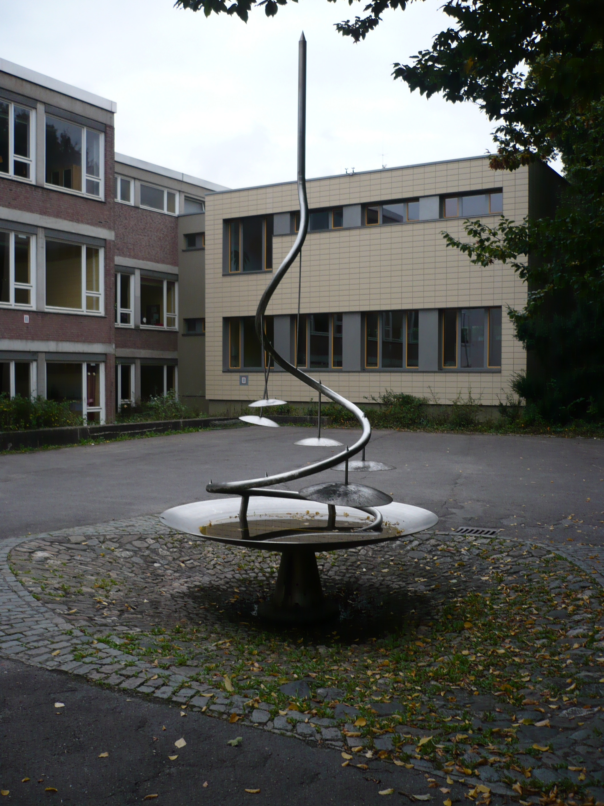 "Wasserspiele", am 30. September 1969 eingeweihter Brunnen des Aachener Bildhauers Philipp Anton an der Malmedyer Straße in Aachen-Burtscheid vor der dortigen Schule GHS Burtscheid. Die Besonderheit des Brunnen ist, daß das aus Düsen des spiralförmig aufsteigenden Rohres zunächst entweichende Wasser beim Zurückfallen auf beckenartige Scheiben trifft und diese zum Klingen bringt. (Bildbeschreibung nach Peter Hermann Loosen, Das alte Aachen, 3. Aufl. Aachen 1978, 62. )